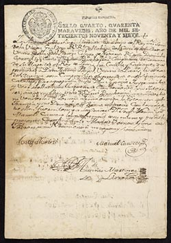 Luigi Boccherini (1743-1805). Contract and thematic index, Madrid:autograph manuscript, 1797 Feb. 21 and July 8.